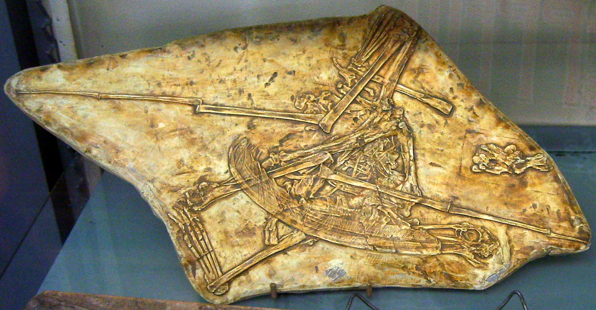 Pterodaustro guinazui fossil cast, Muséum national d'Histoire naturelle, Paris.